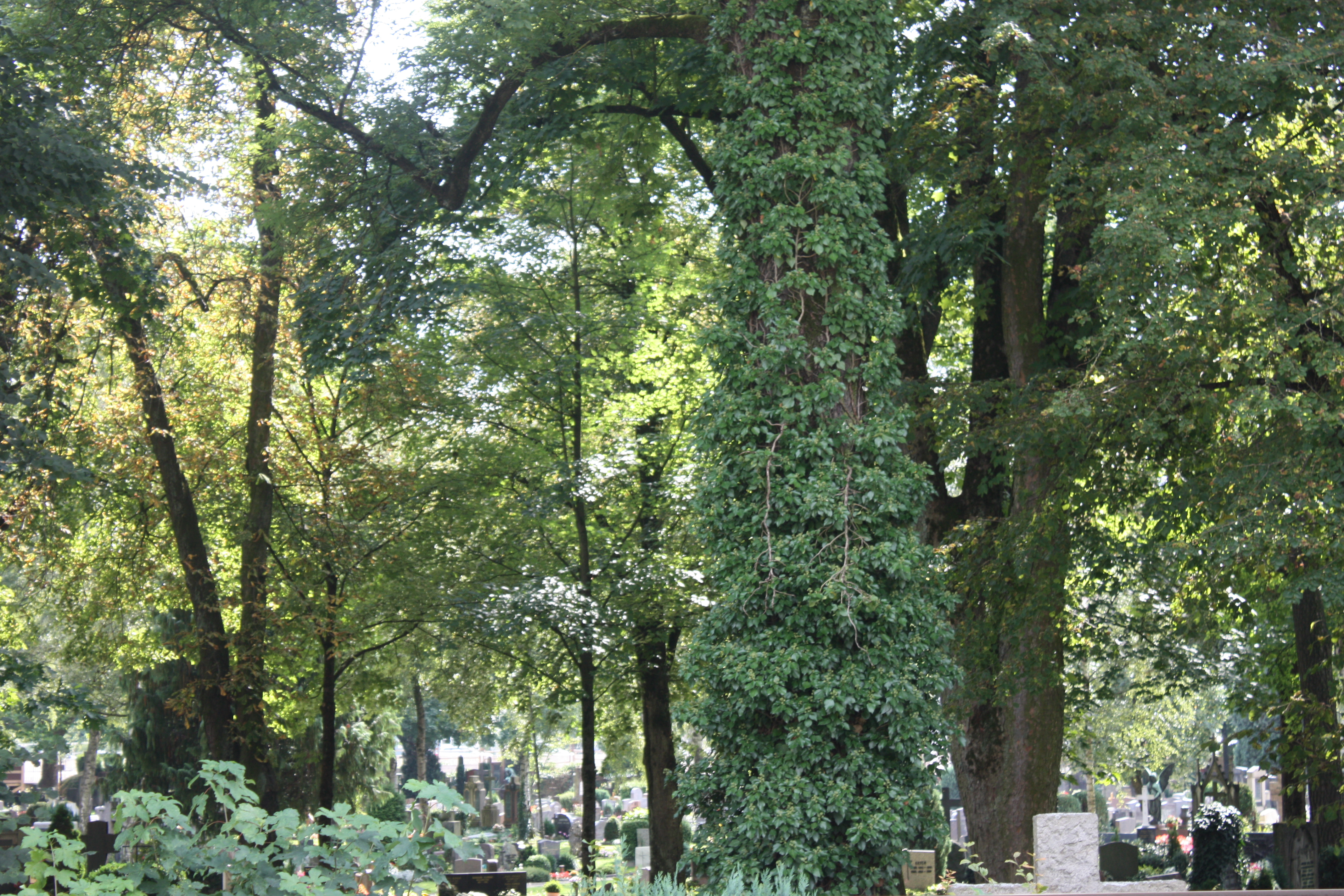 Leonhardsfriedhof Schwäbisch Gmünd von Norden